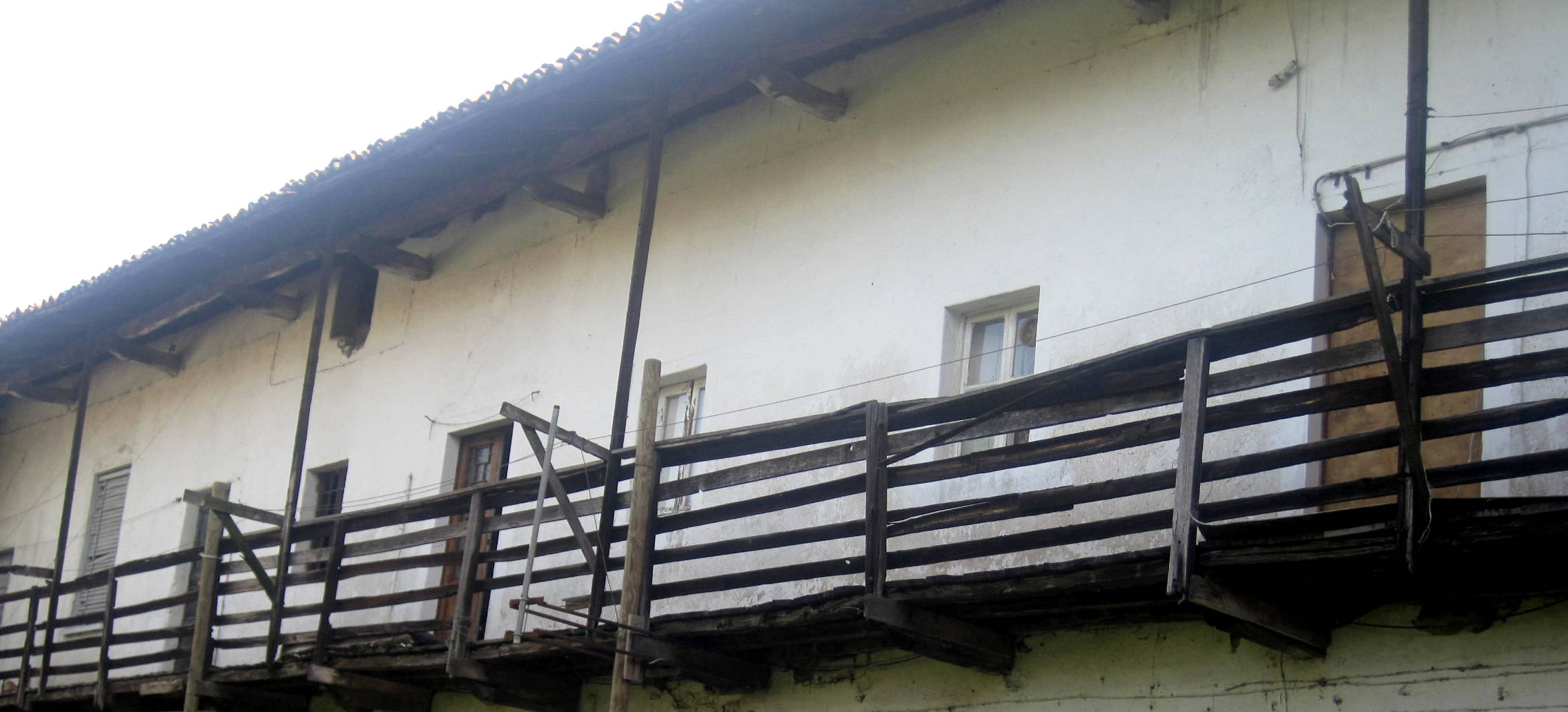 Cascina Burattana This is a photo of a monument which is part of cultural heritage of Italy.